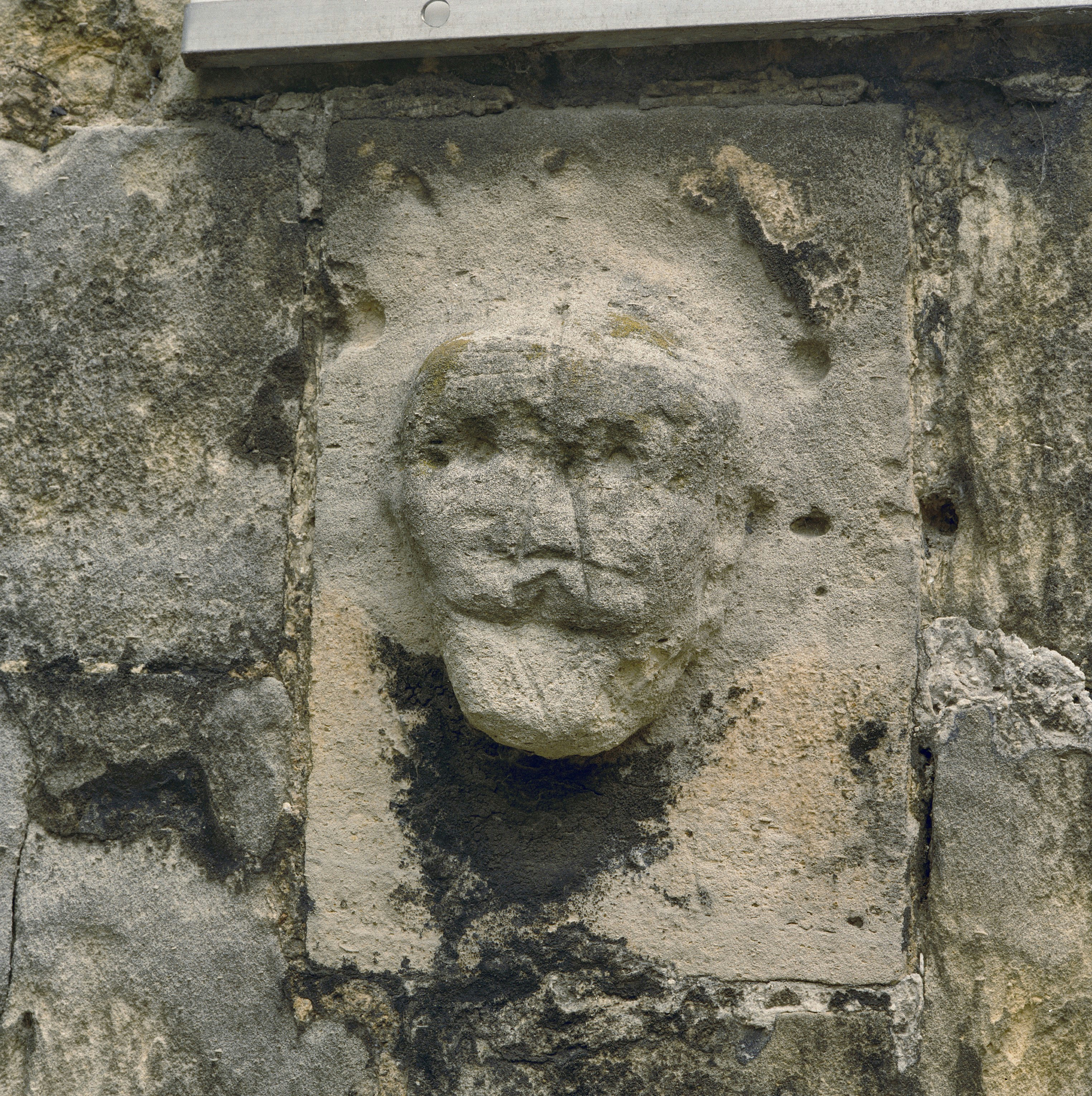 Kasteel Wijnandsrade: Exterieur BINNENPOORT, KOPJE LINKS VAN DE DOORGANG